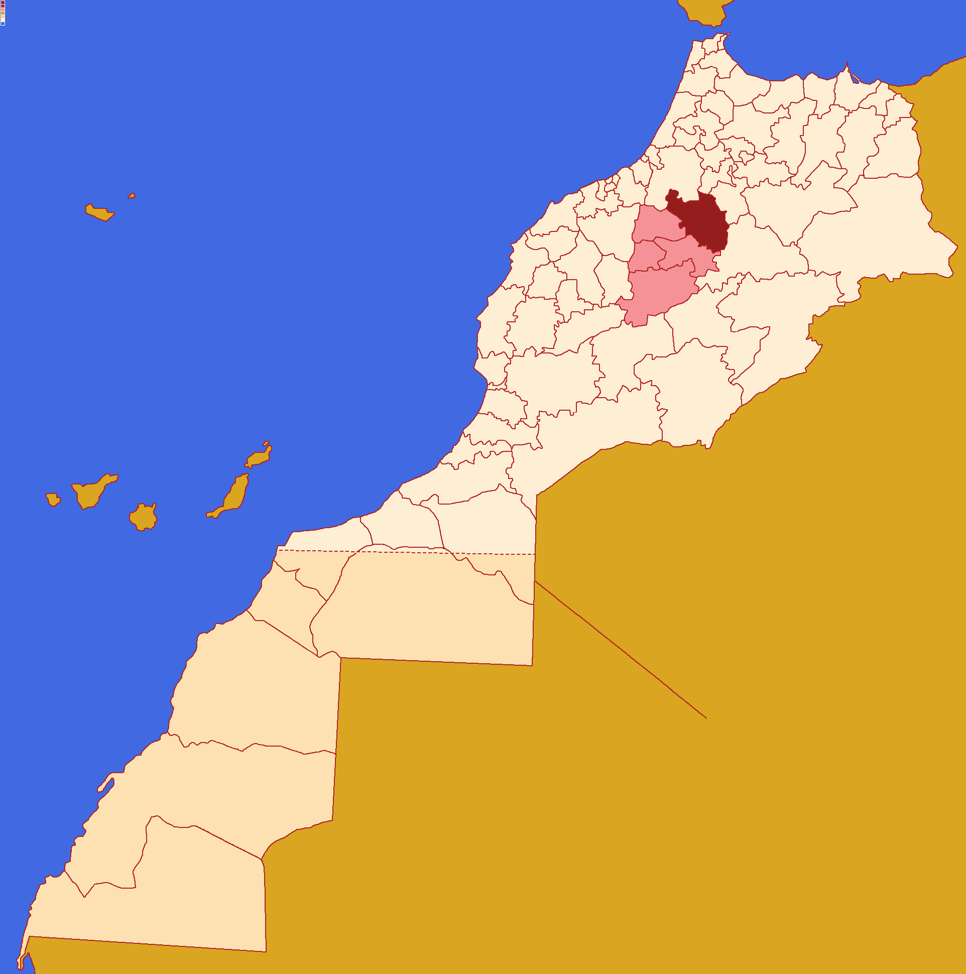 Localização da província de Quenifra ,dentro da região de Beni Mellal-Quenifra ,dentro de Marrocos.Conforme a reforma administrativa de 2015.